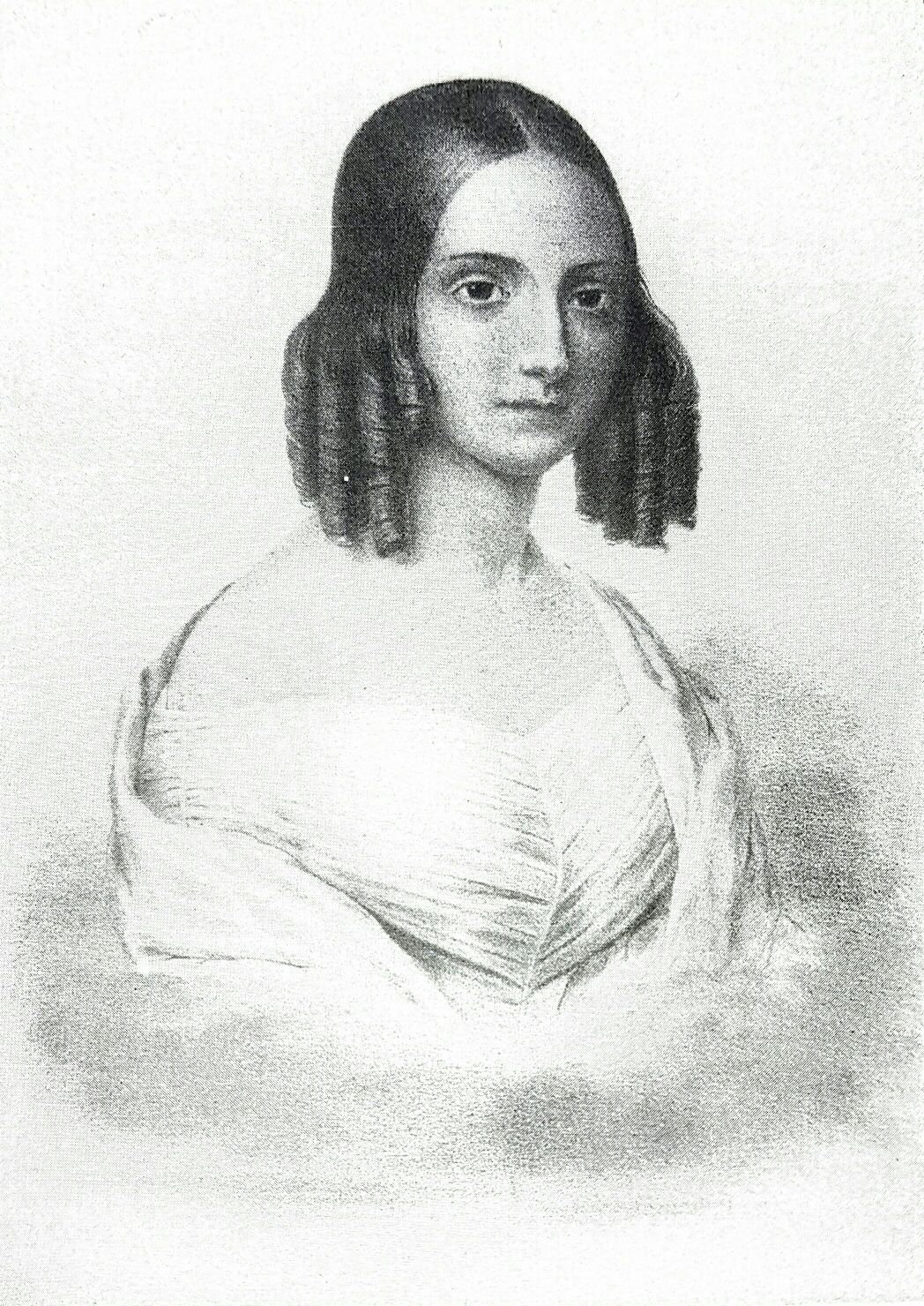 Vittoria Savorelli in un ritratto d'epoca